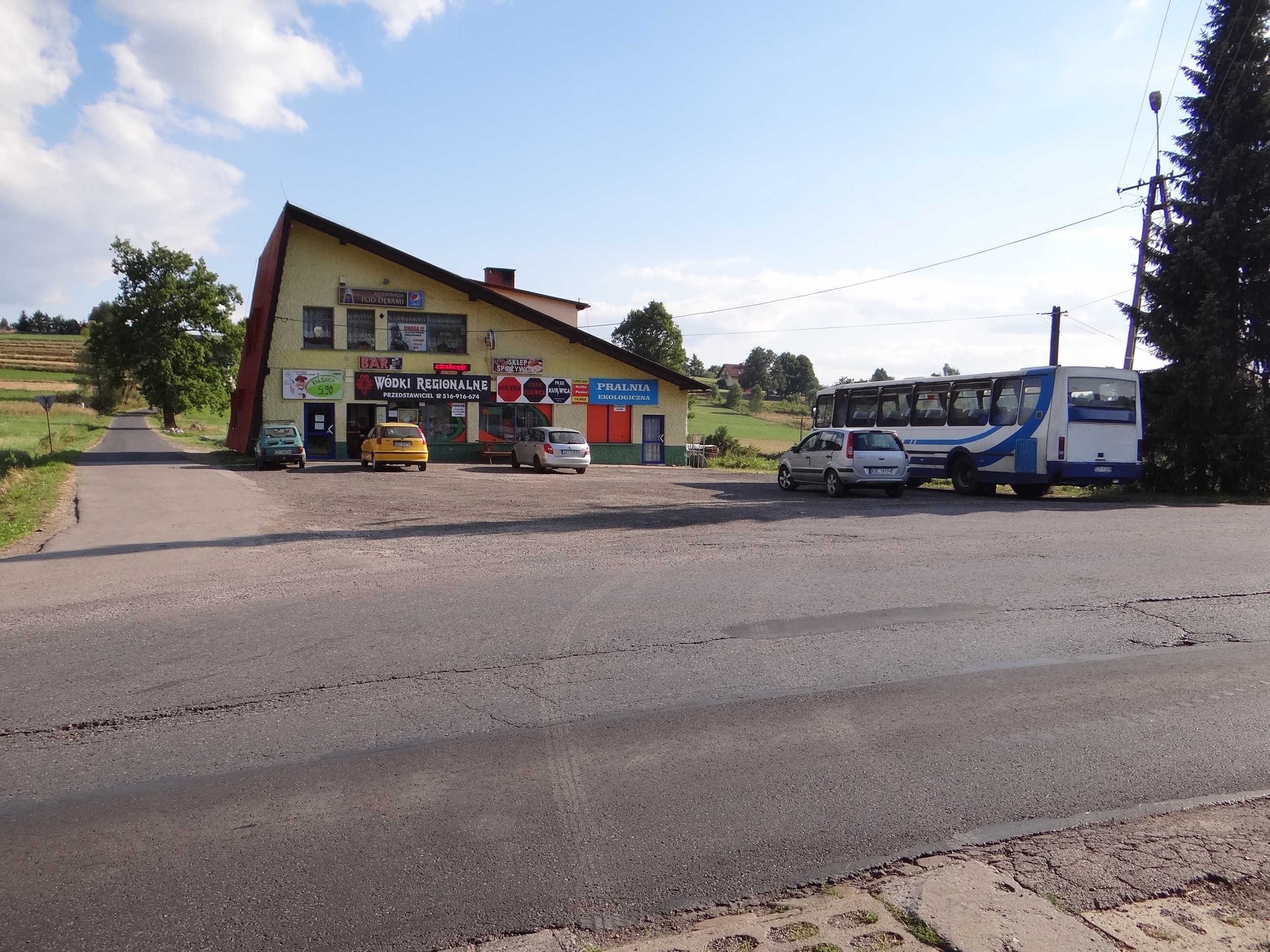 Rejon przełęczy Przydawki w miejscowości Kocoń